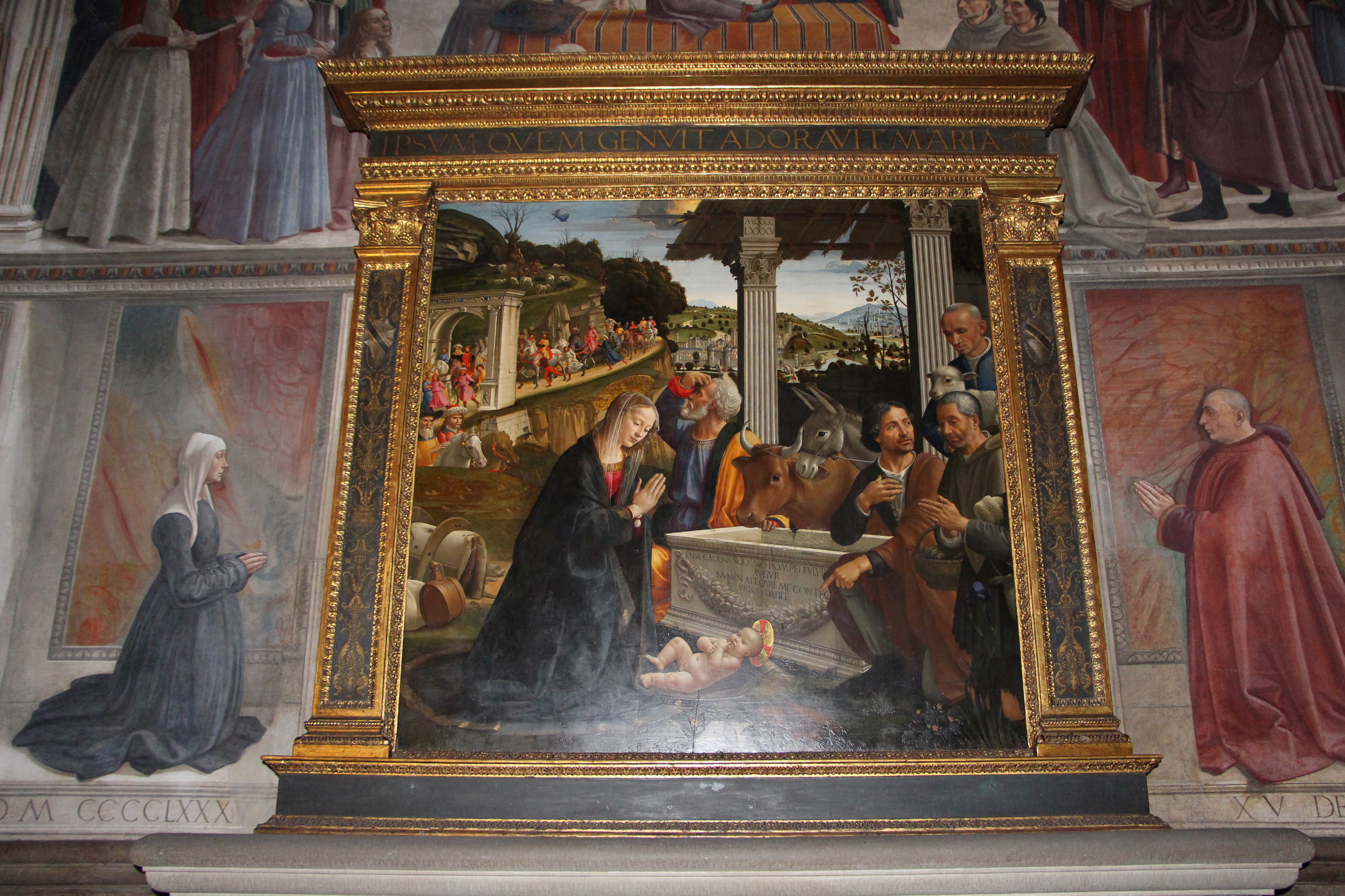 Santa Trinita (Firenze)